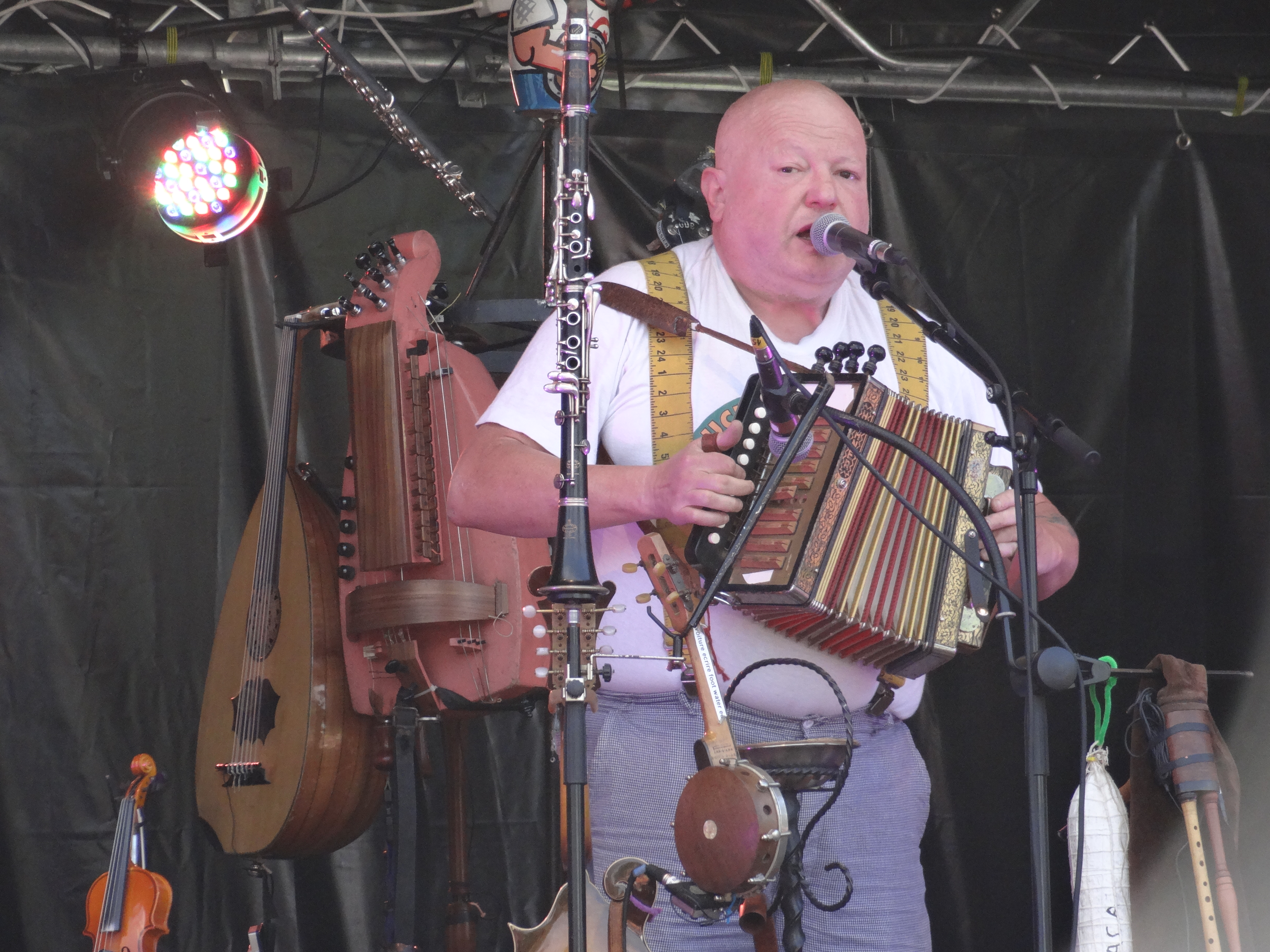 François Hadji-Lazaro avec son groupe Pigalle en représentation le 26 mai 2013 lors du festival des 3 Éléphants à Laval en Mayenne.